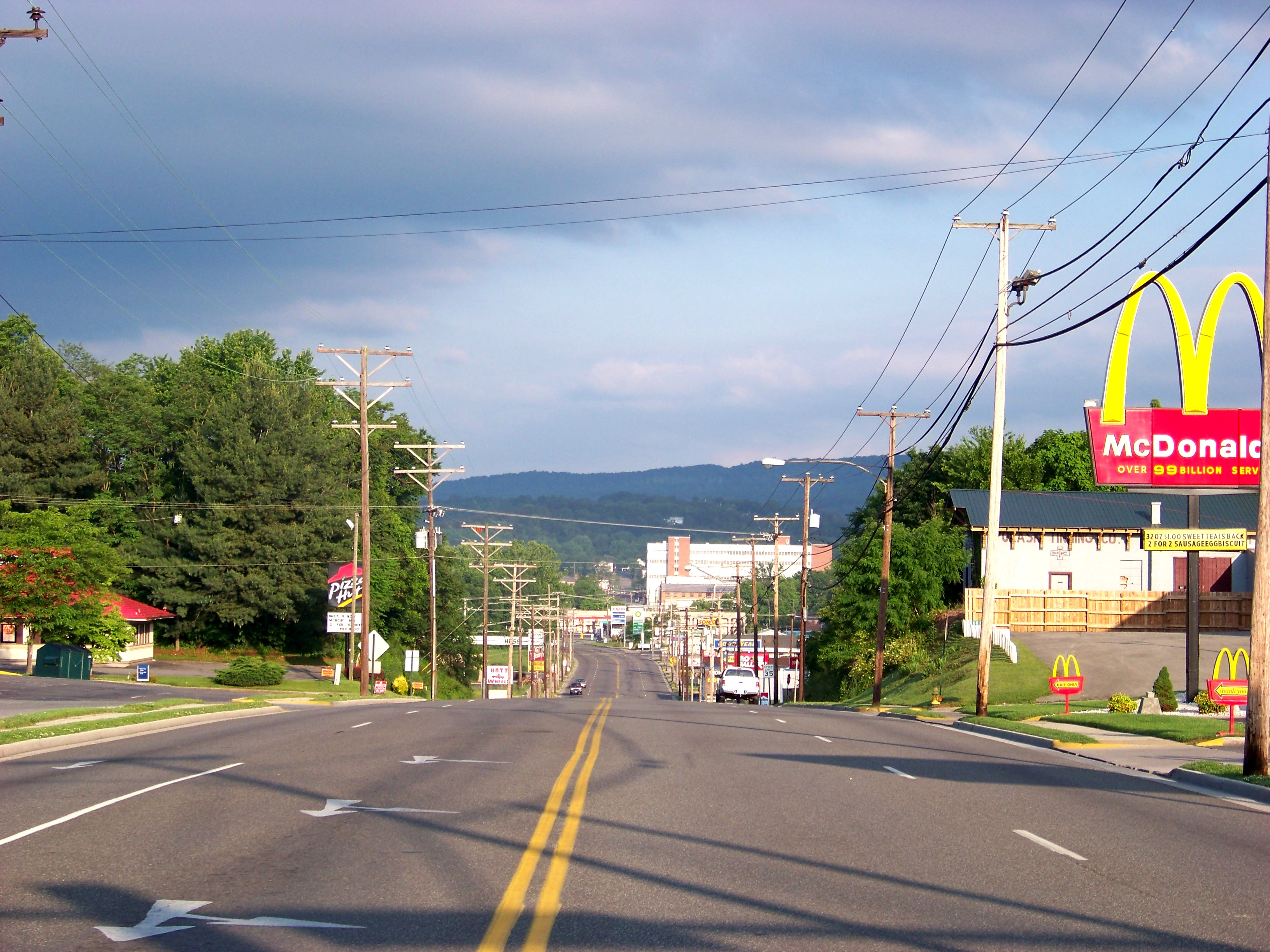 Main Street - Pulaski, Virginia